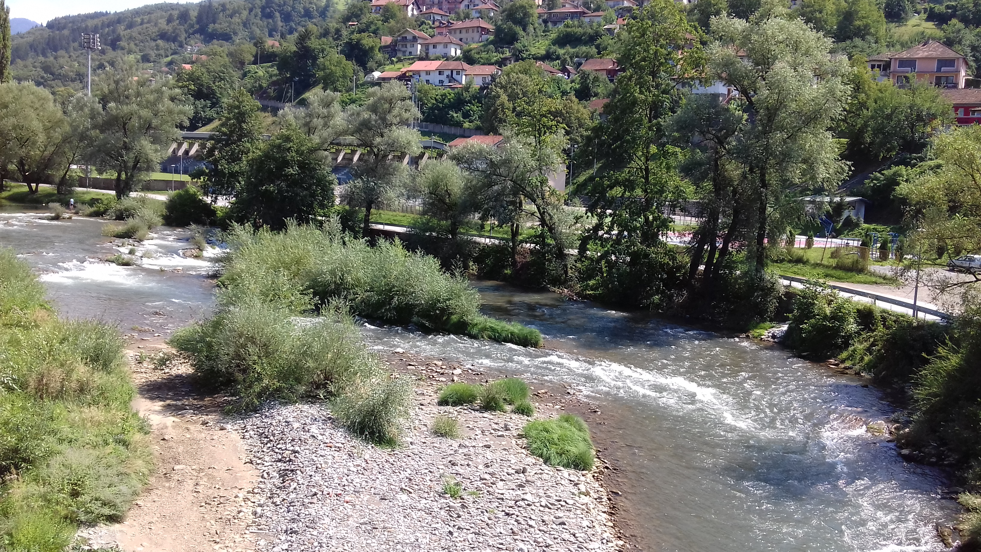 Srpski (latinica): Drina u Foči